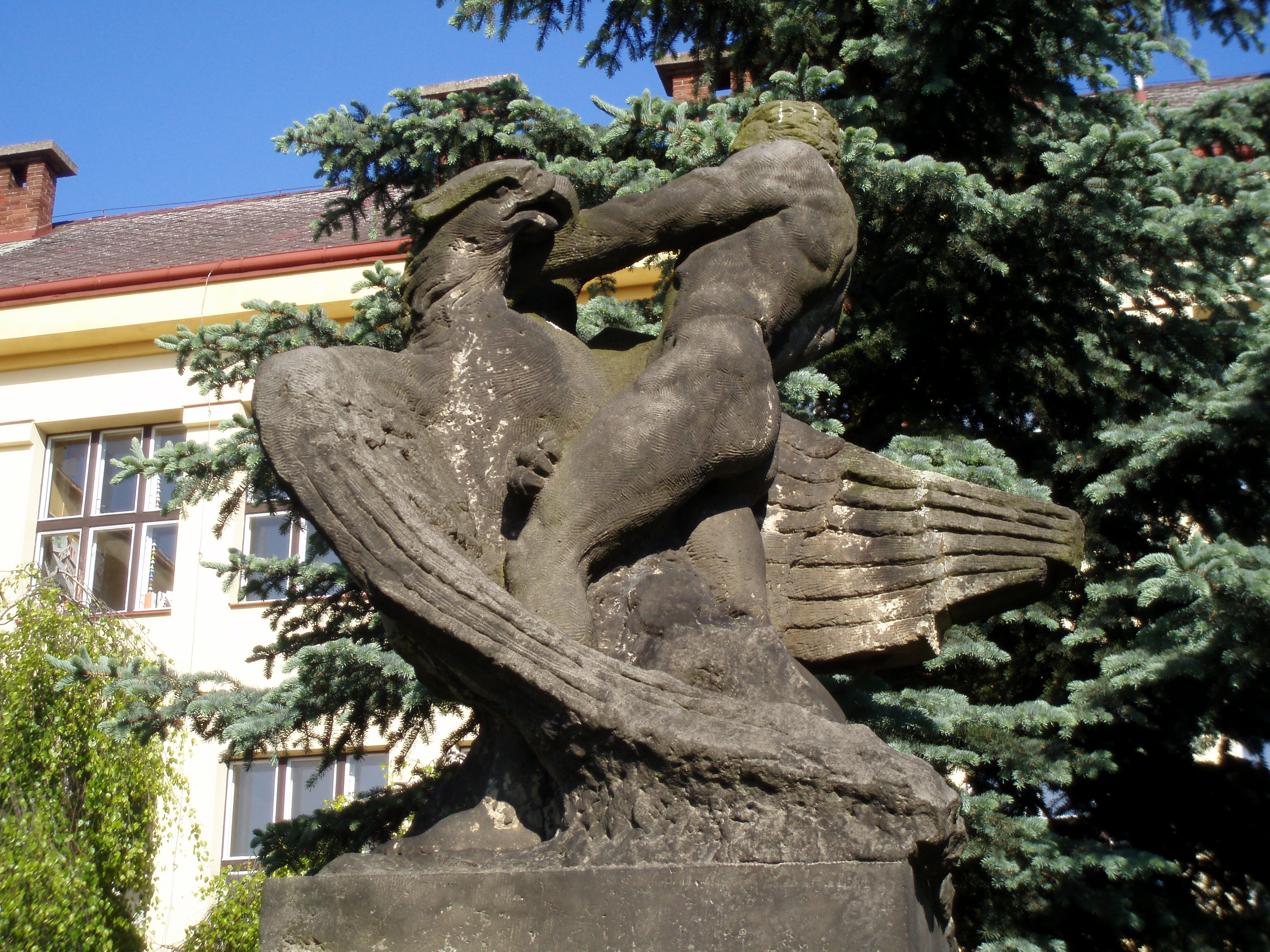 Pomník padlým v 1. světové válce v Plotištích nad Labem